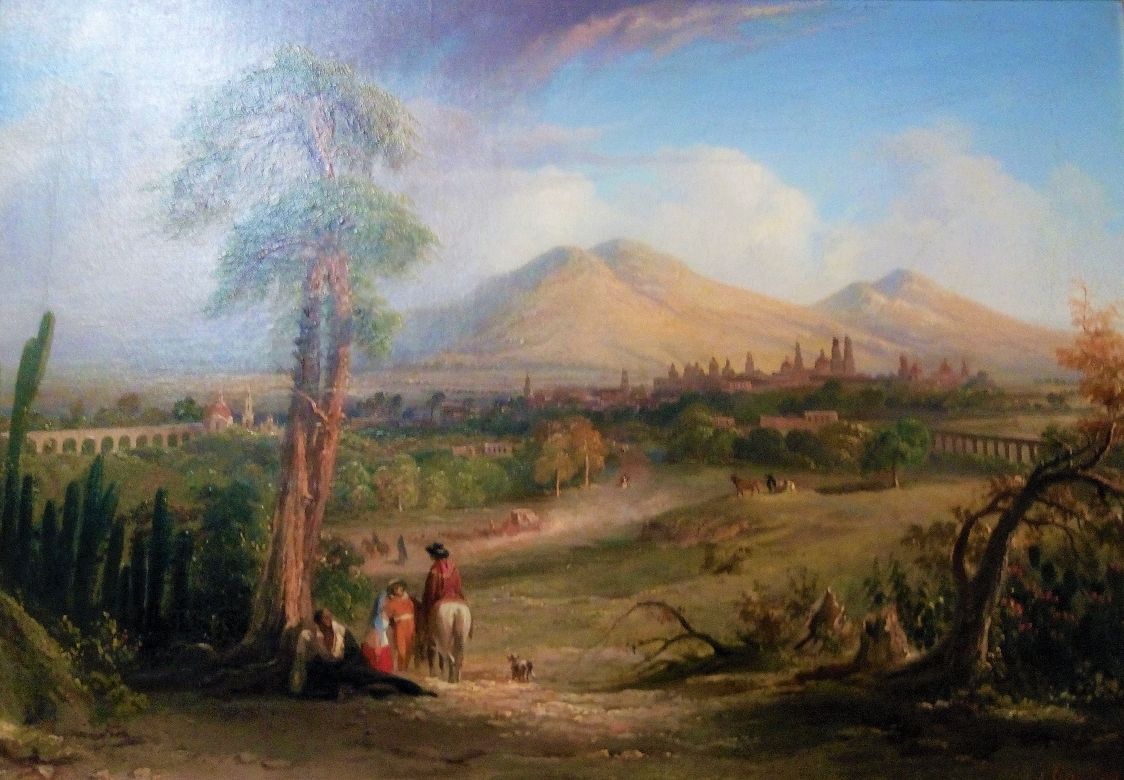 Pintura de Morelia, 1838